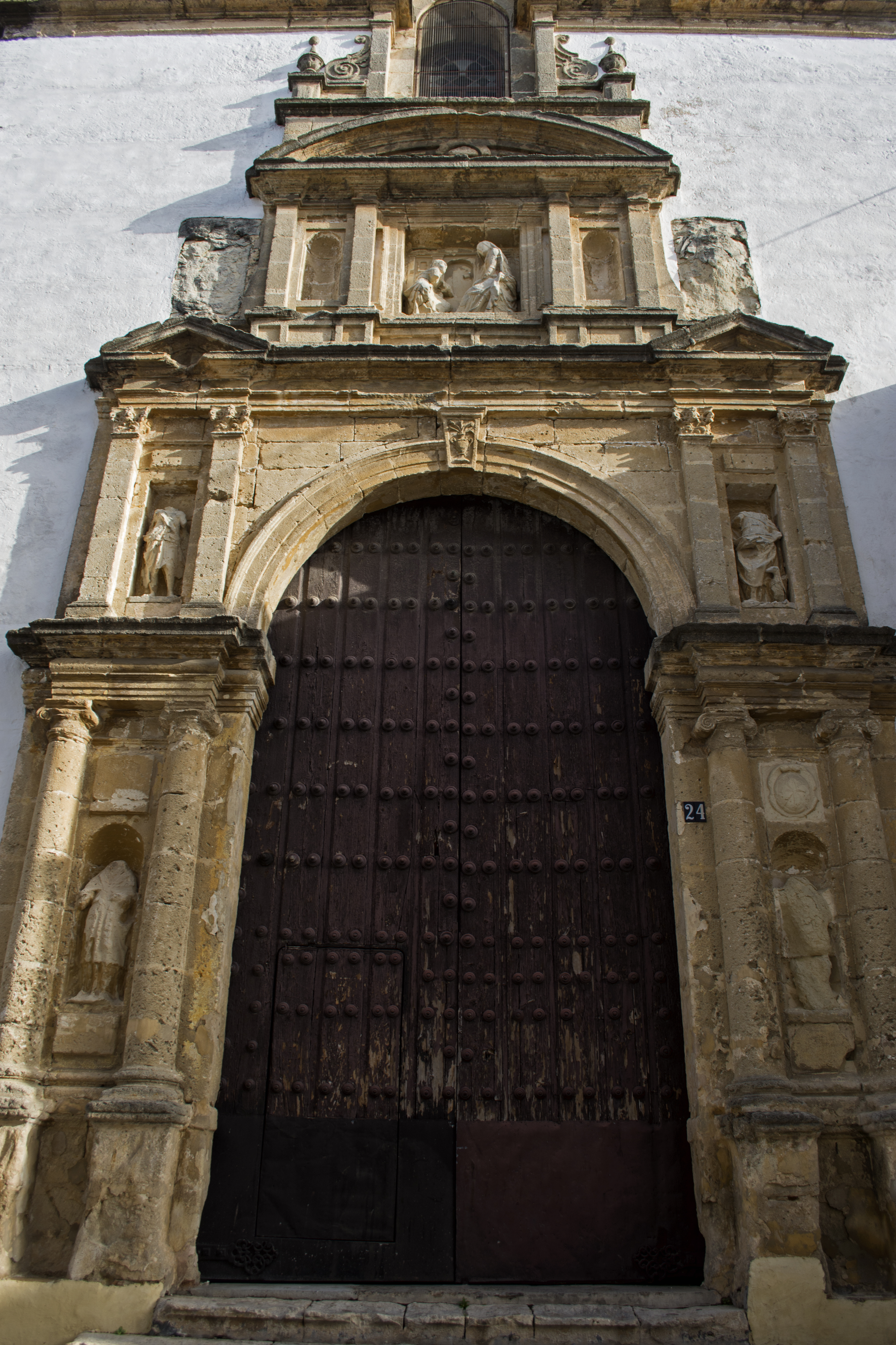 Portada de la basílica de Nuestra Señora de la Caridad, Sanlúcar de Barrameda.